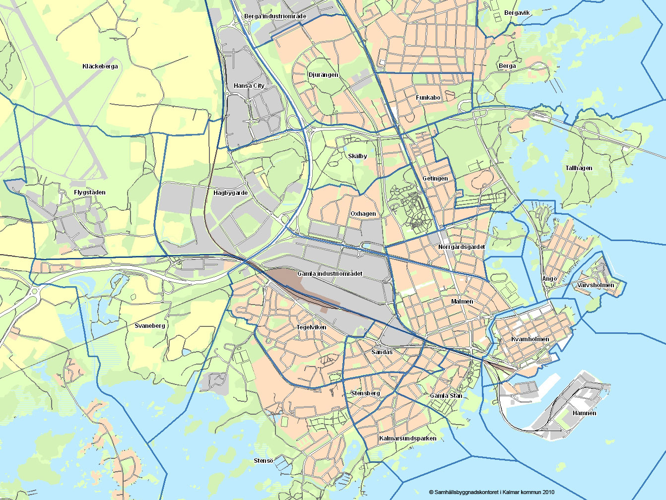 Tätortskarta över Kalmar